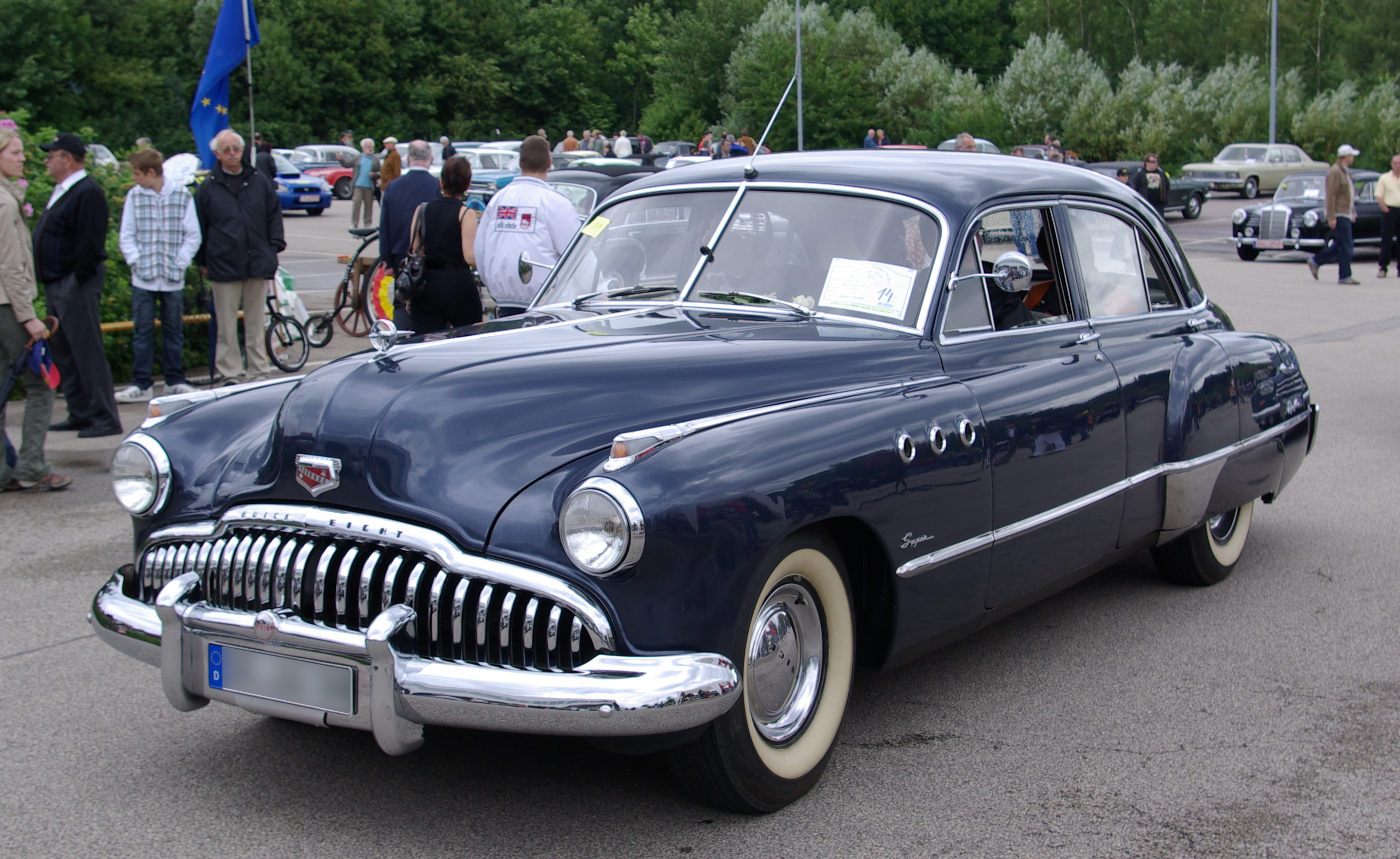 Buick Super Serie 50, Baujahr 1949, aufgenommen bei / photographed at "25. Internationales Konzer Oldtimer-Treffen", 19. Juli 2009